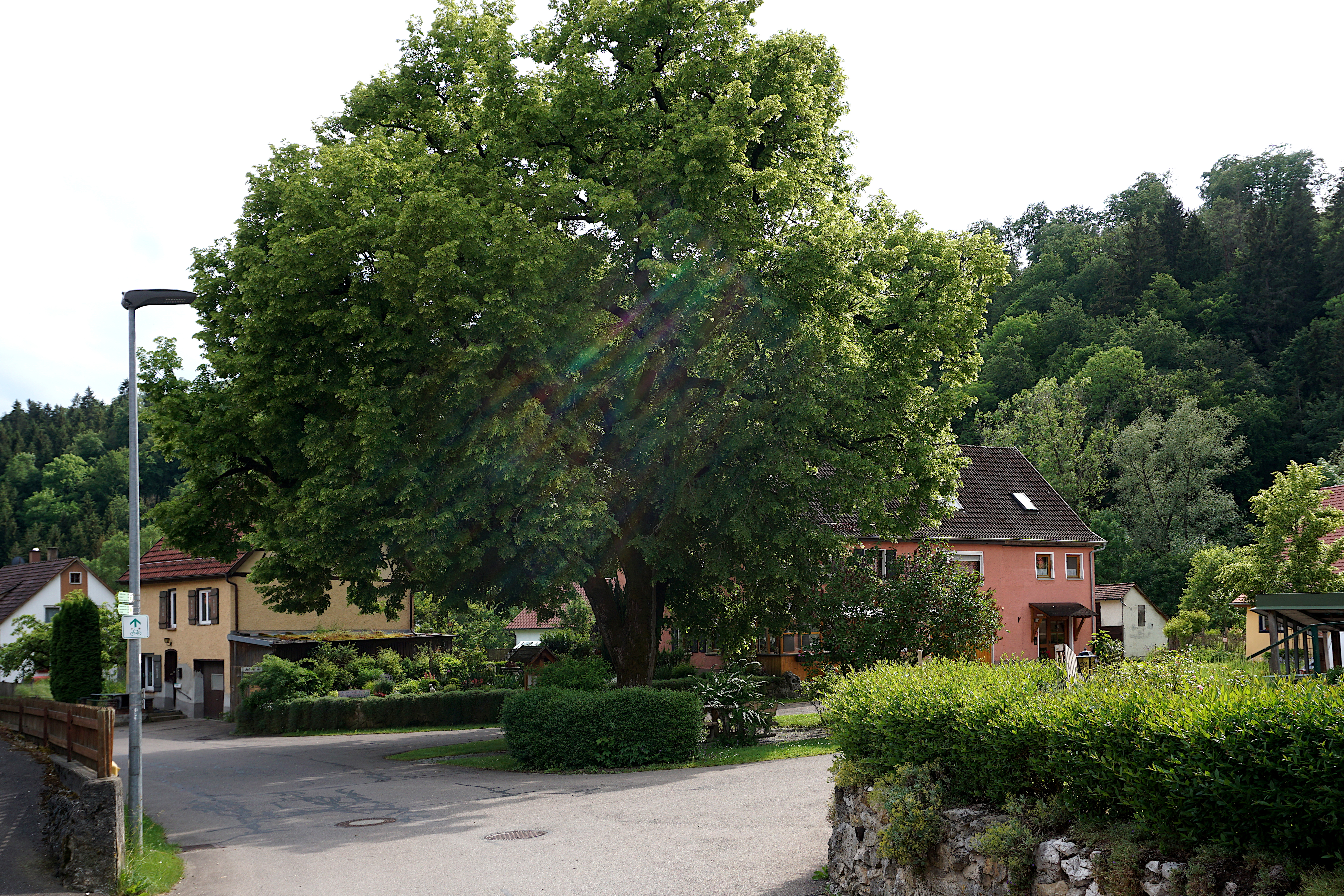 Ortsmitte von Gundelfingen. Die Linde in der Ortsmitte von Gundelfingen ist ein Naturdenkmal mit der Schutzgebiets-Nr. 84150530300.